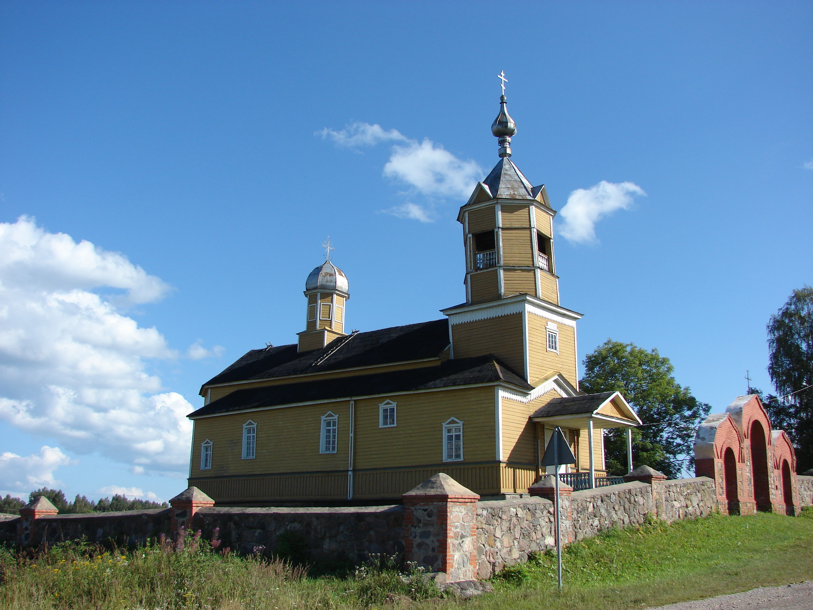 Lauderu Sv. Nikolaja pareizticīgo baznīca (1767.), Lauderu pagasts, Zilupes novads, Latvia